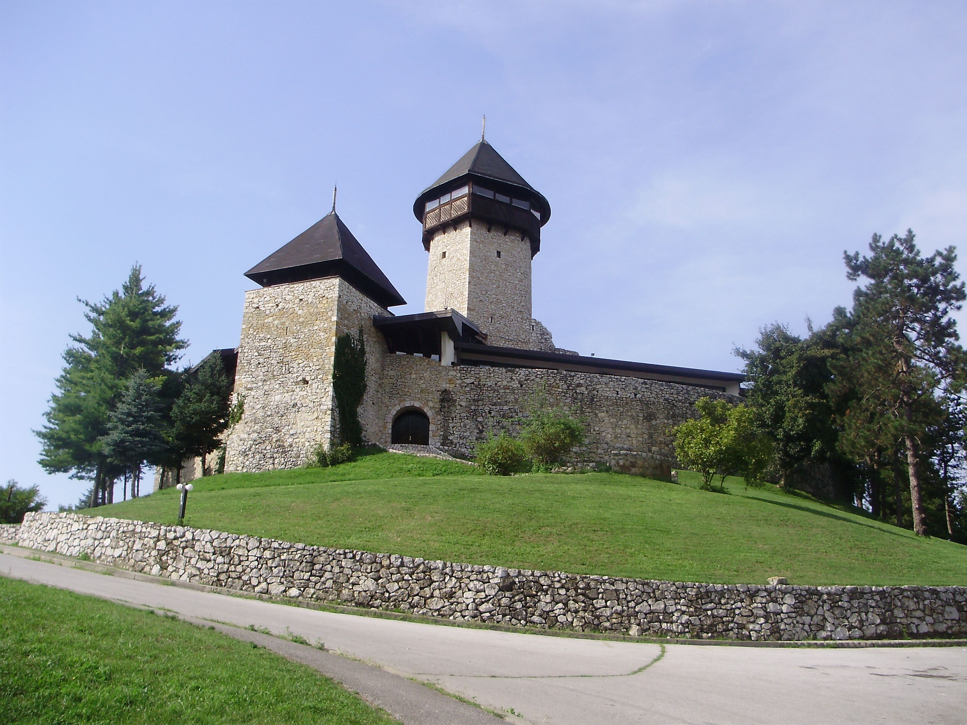 Stari grad u Velikoj Kladuši